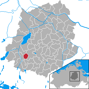 Gülzow, Landkreis Demmin, Mecklenburg-Vorpommern